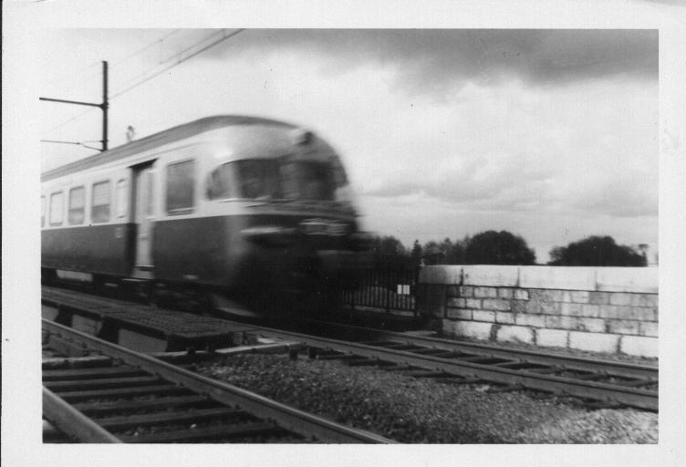 Rame Trans Europ Express (TEE) Le Cisalpin, sur la ligne Dijon-Dole, franchissant le pont sur la Saône dans les années 1964-1965